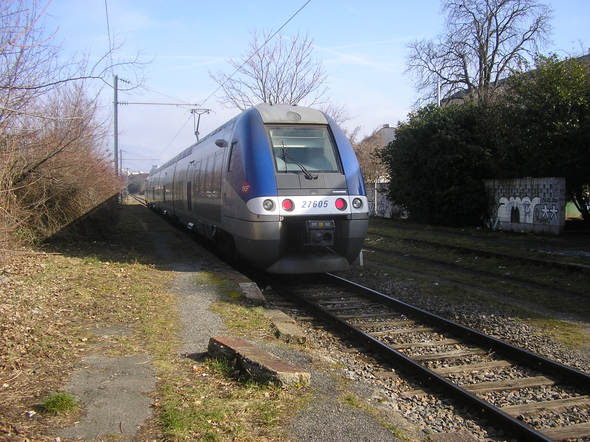 Gare de Chêne-Bourg, désaffectée. TER en direction d'Annemasse.